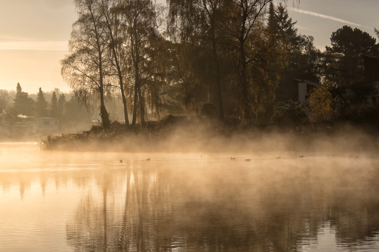 Birkerød Sø, Birkerød, Denmark